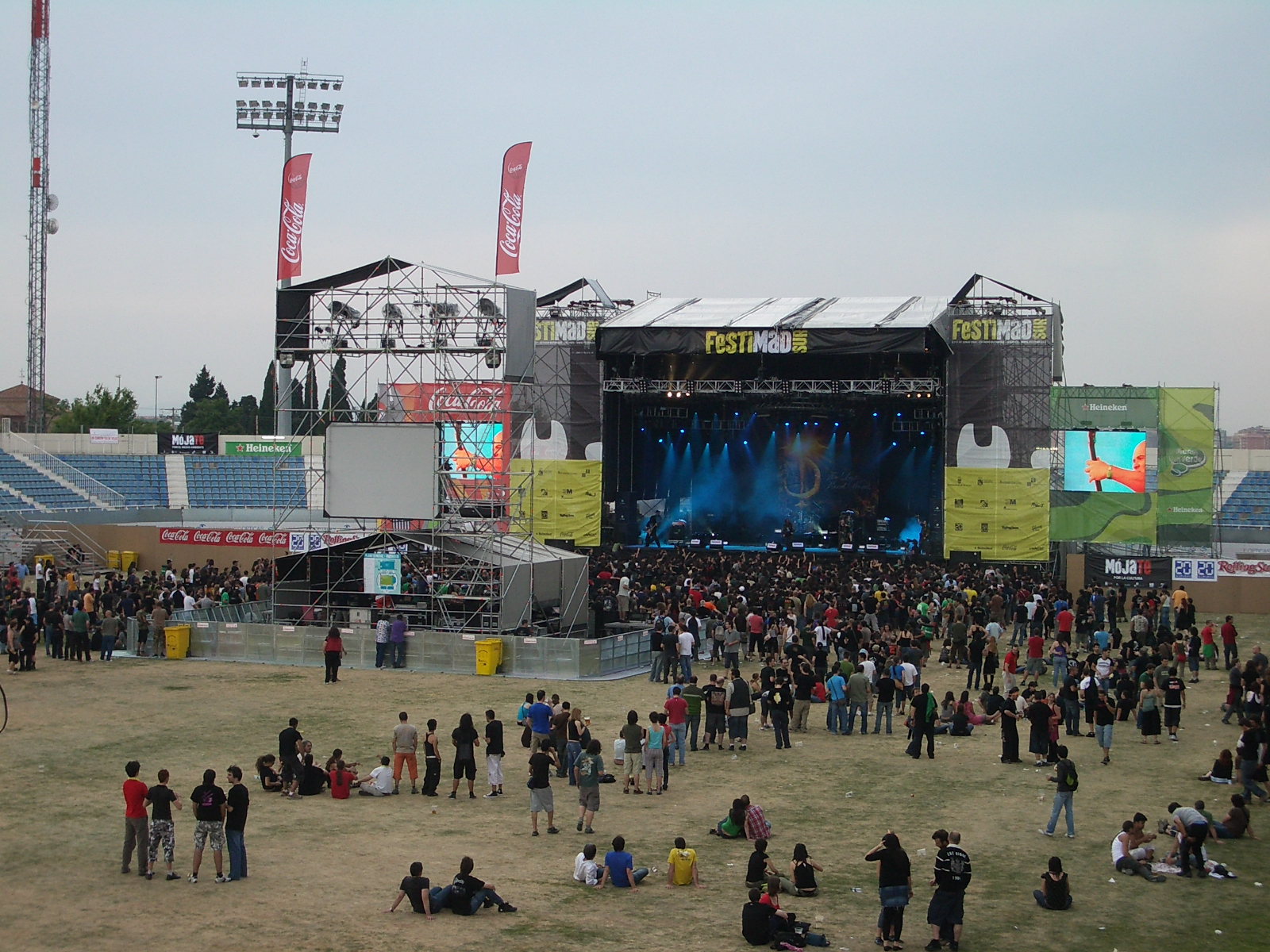 Vista general de Festimad 2007.